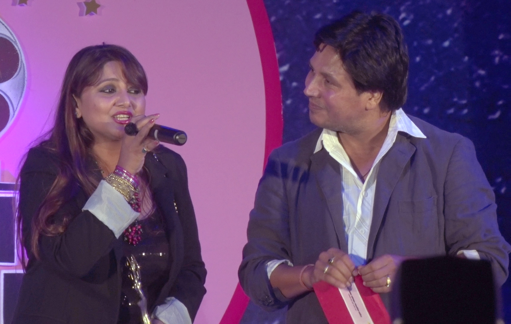 नेपाली: Deepak n Deepa , Nepali Actor